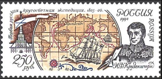 марка